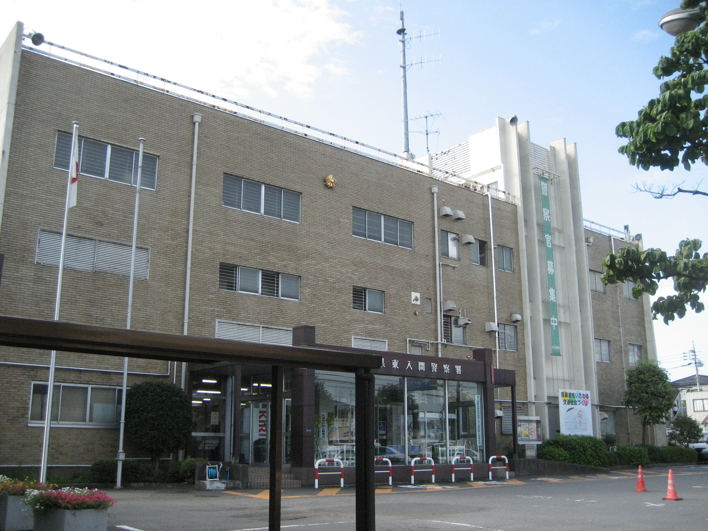 東入間警察署庁舎